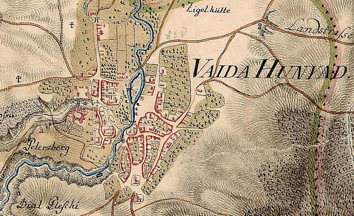 Castelul Huniazilor si Hunedoara în Harta Iozefină a Transilvaniei, 1769-73.